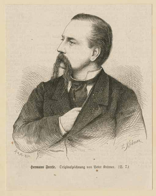 Portrait des "Jagd-Malers" Hermann Freese (1819-1871)